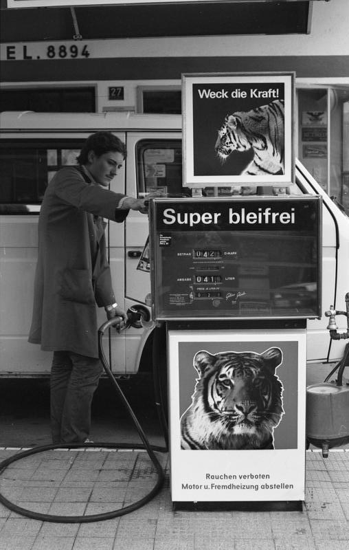 Juni 1988 Bad Wimpfen